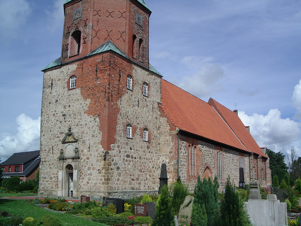 Dorum, Kirche St. Urbanus Foto von Benutzer:Geoz 2005